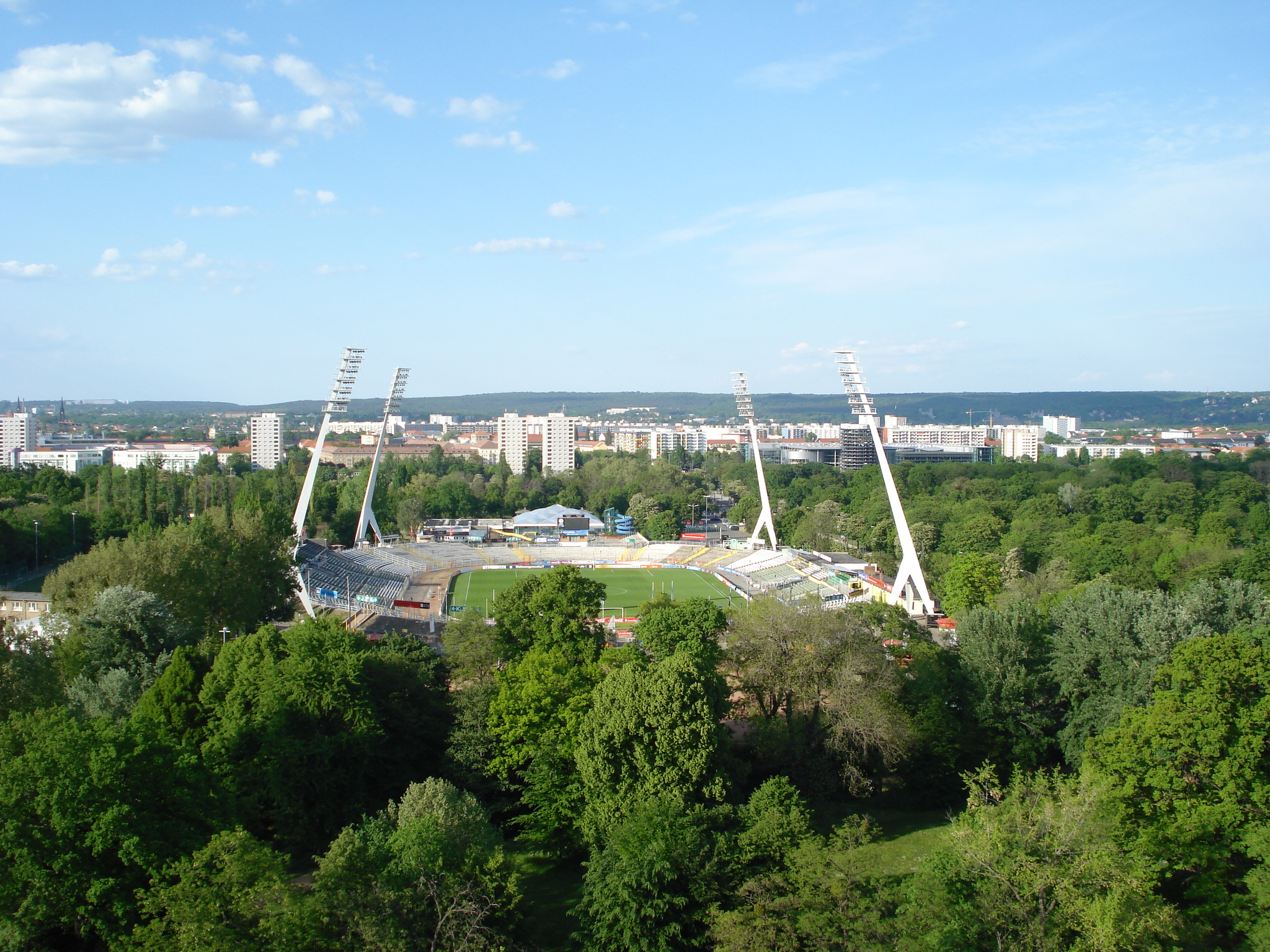 Dynamo Stadium (Dresden)